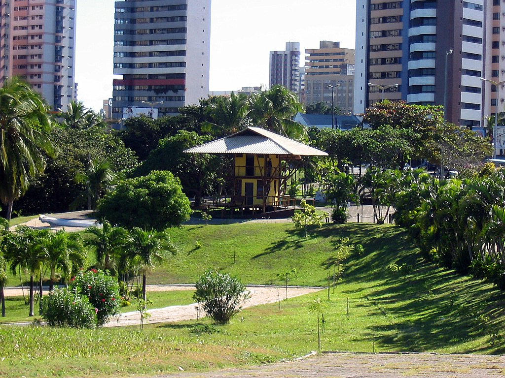 Posto policial no Parque do coco em Fortaleza